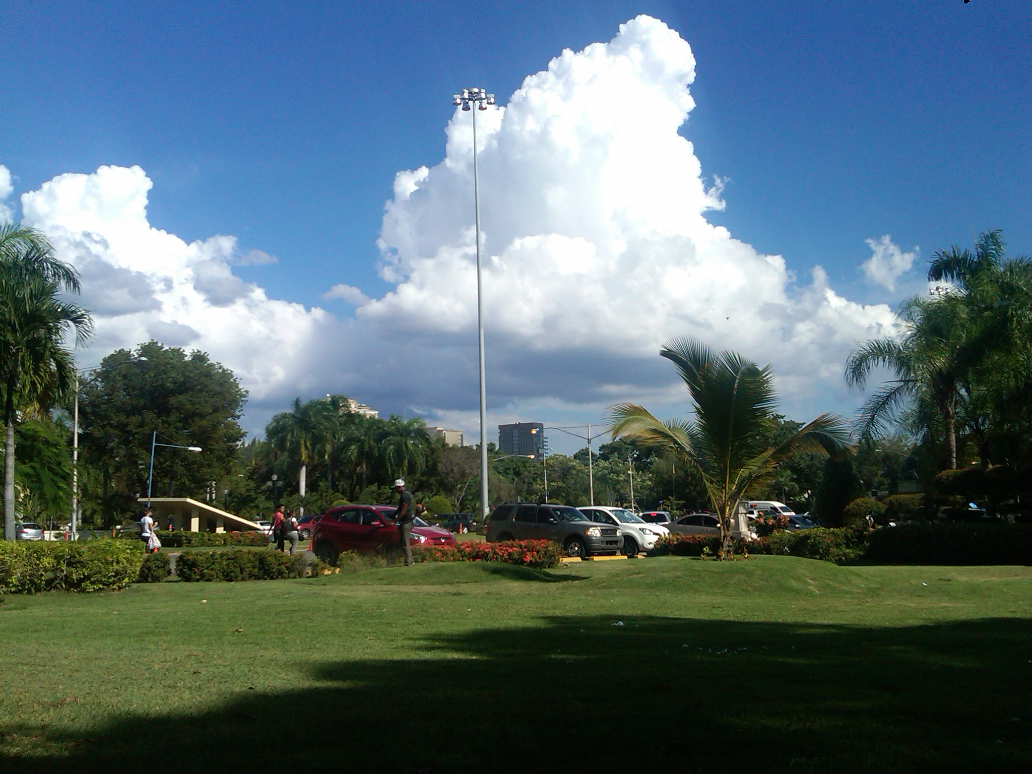 Area de Jardin de la rectoría